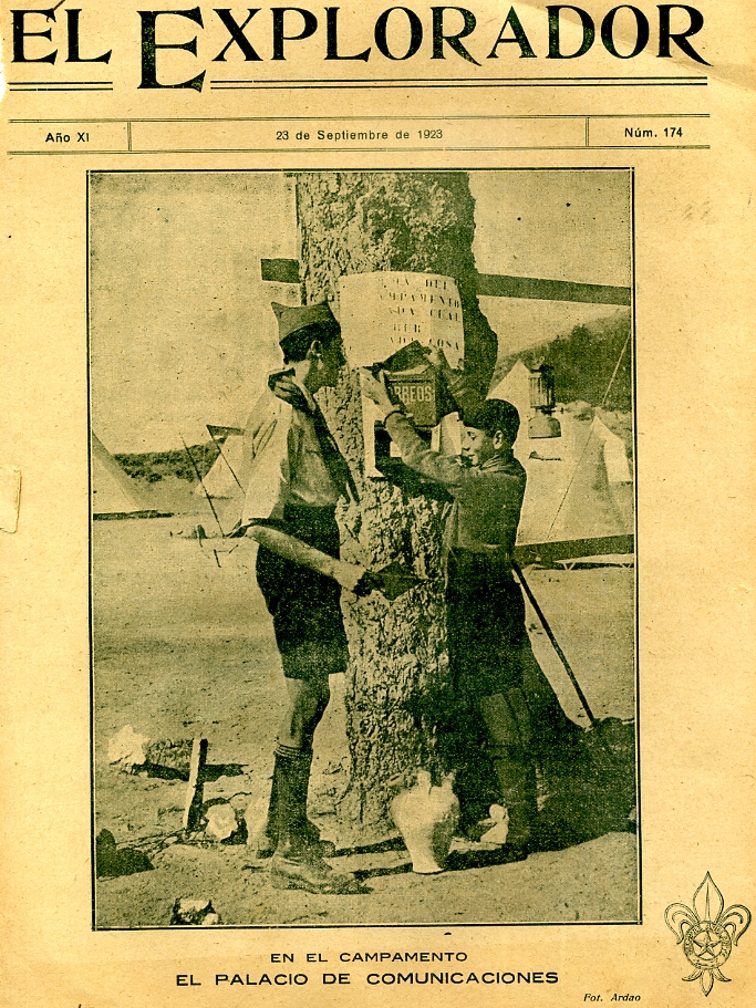 Revista El Explorador número 174 del 23 de septiembre de 1923